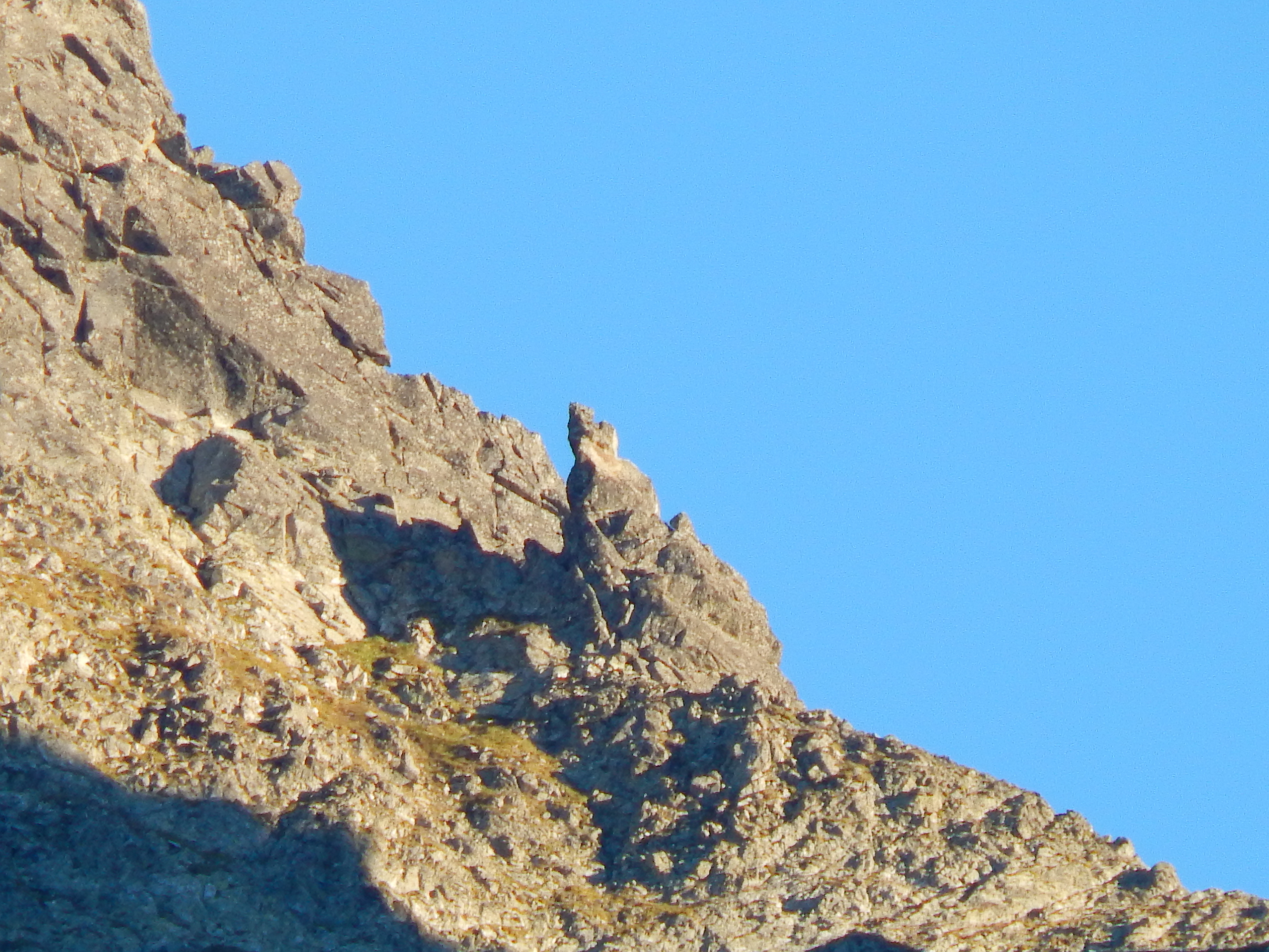 Turniczka na grani Mięguszowieckich Szczytów